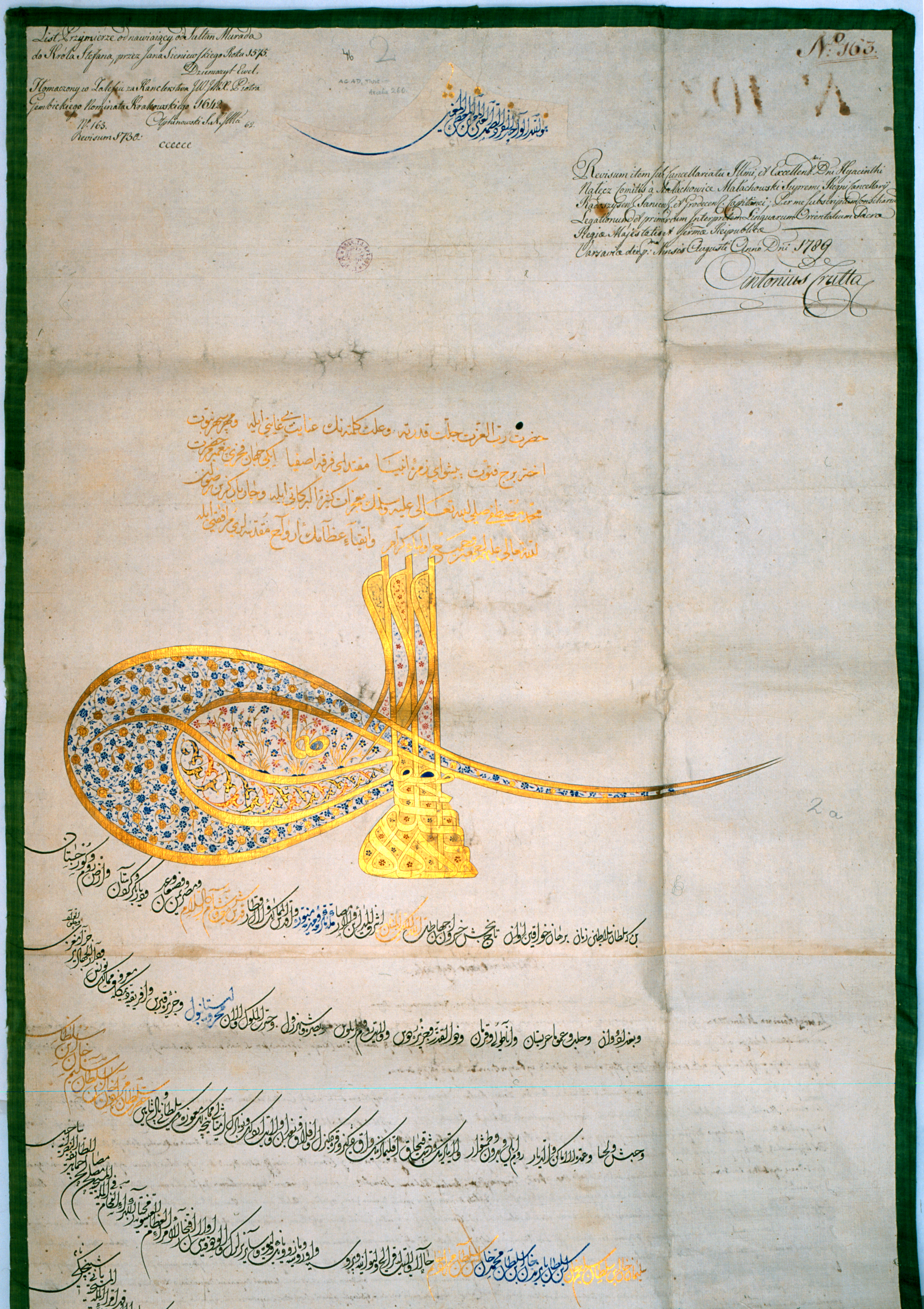 List Murada III do Stefana Batorego odnawiający przymierze polsko-tureckie